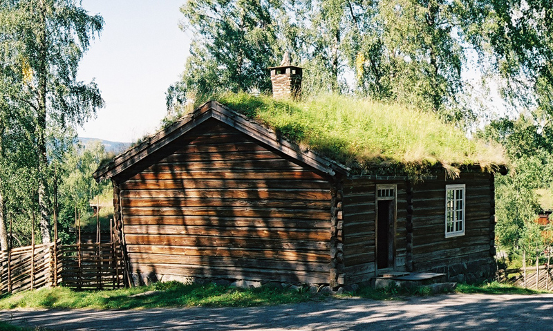 Skolehuset fra Øygarden i Skjåk. Bygd i 1860-åra. Gjenreist på Maihaugen 1931.